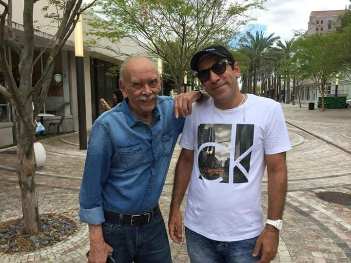 Foto reciente de Nelson Rodriguez Zurbarán para ser usada en la entrada con el mismo nombre.